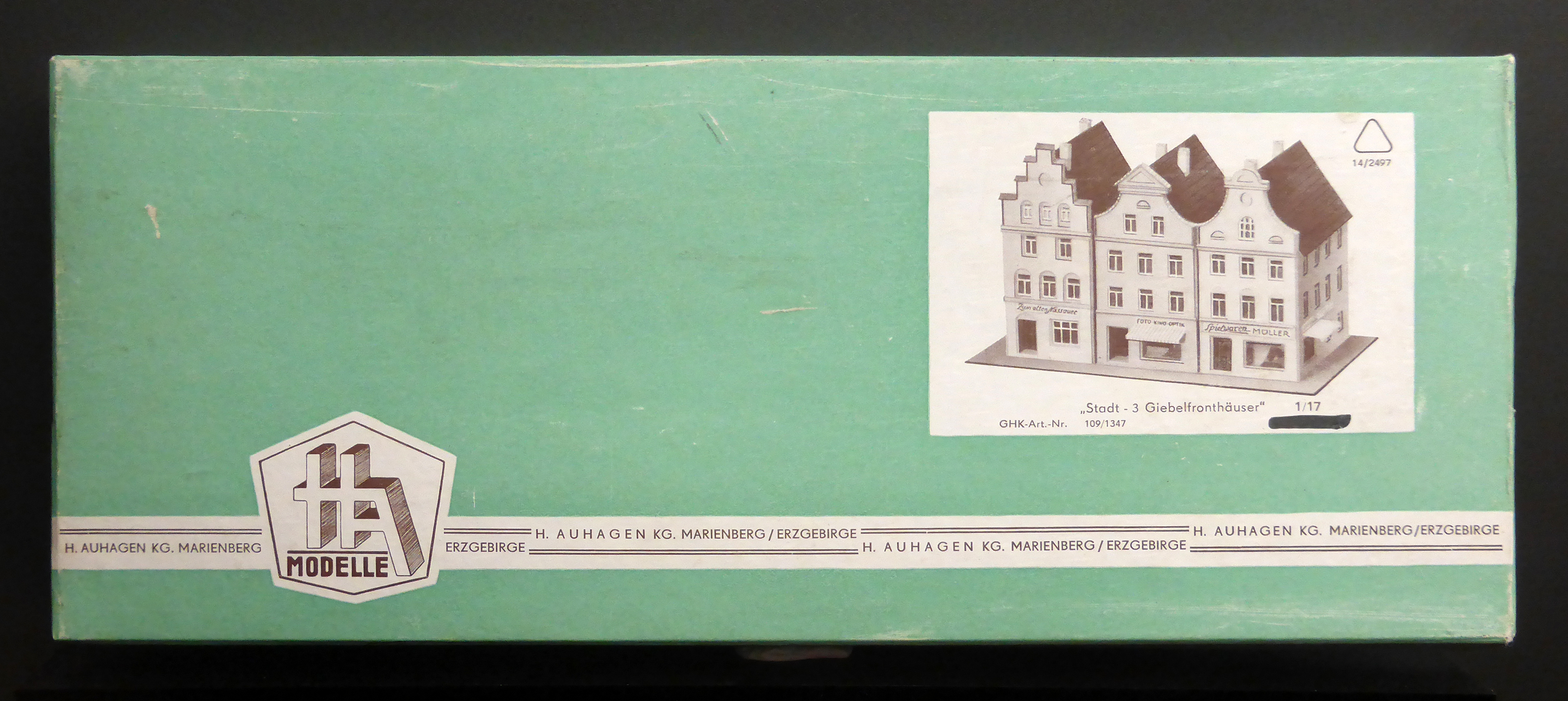 Auhagen-Verpackung: Stadt 3 "Giebelfronthäuser" um 1960. Ausgestellt im Museum sächsisch-böhmisches Erzgebirge in Marienberg.